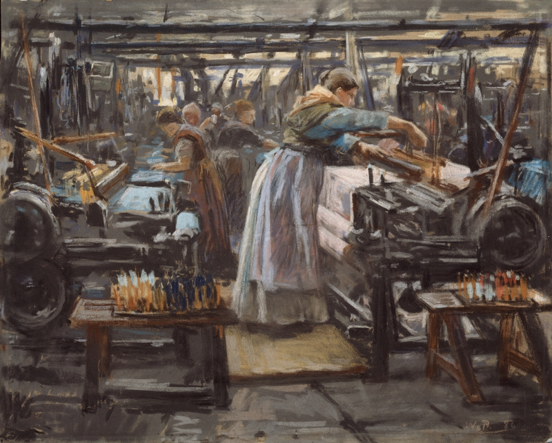 Fra Hjula Veveri, av Wilhelm Peters